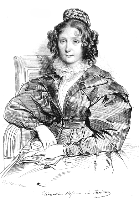 Klementyna z Tańskich Hoffmanowa